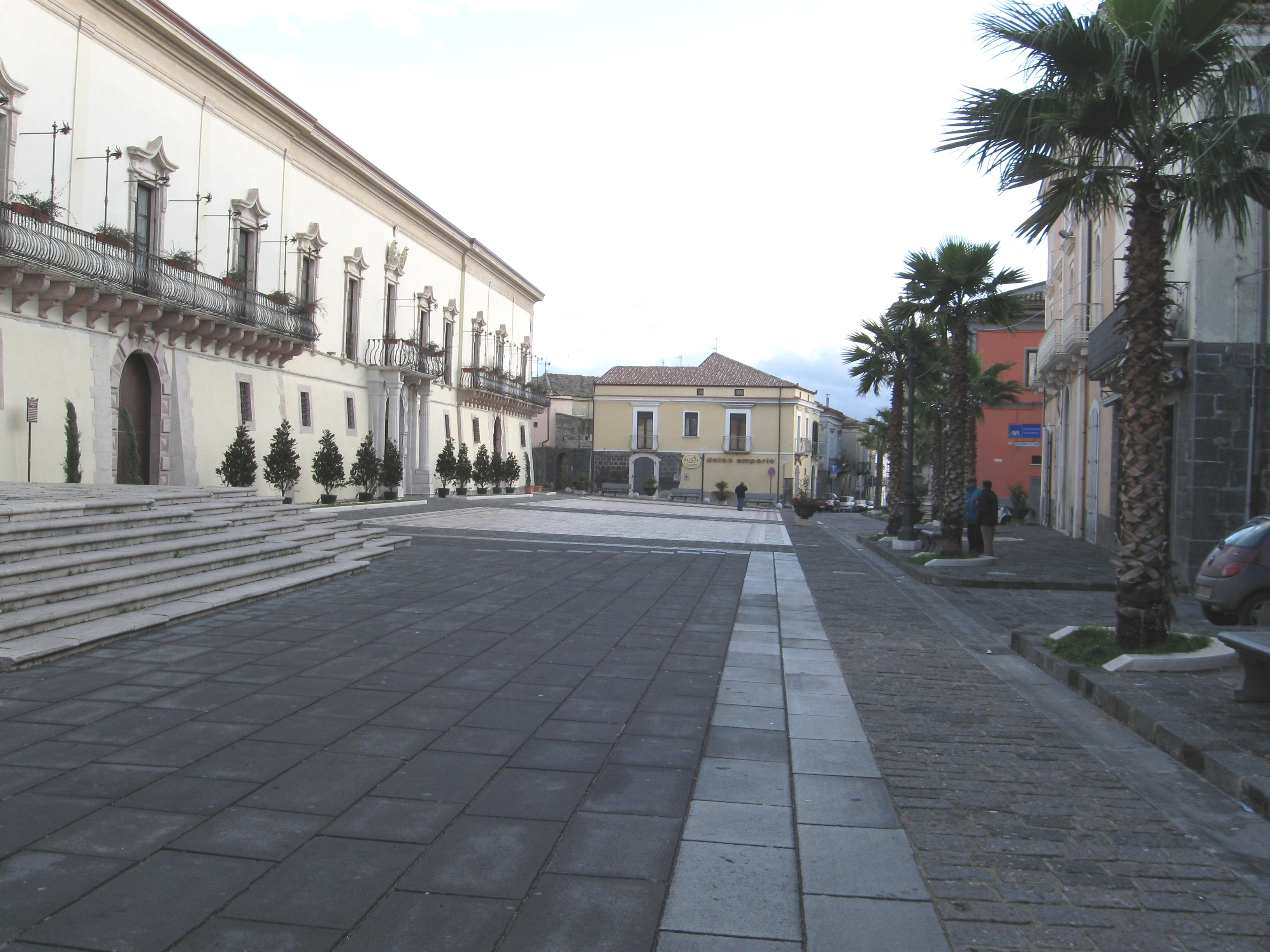 Piazza Duomo, Melfi, Basilicata